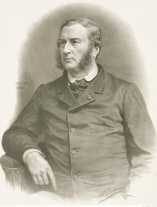 Jules Louis Béhier (s. d.) Photographe : Trinquart Dessinateur : Lafosse Technique : Lithographie